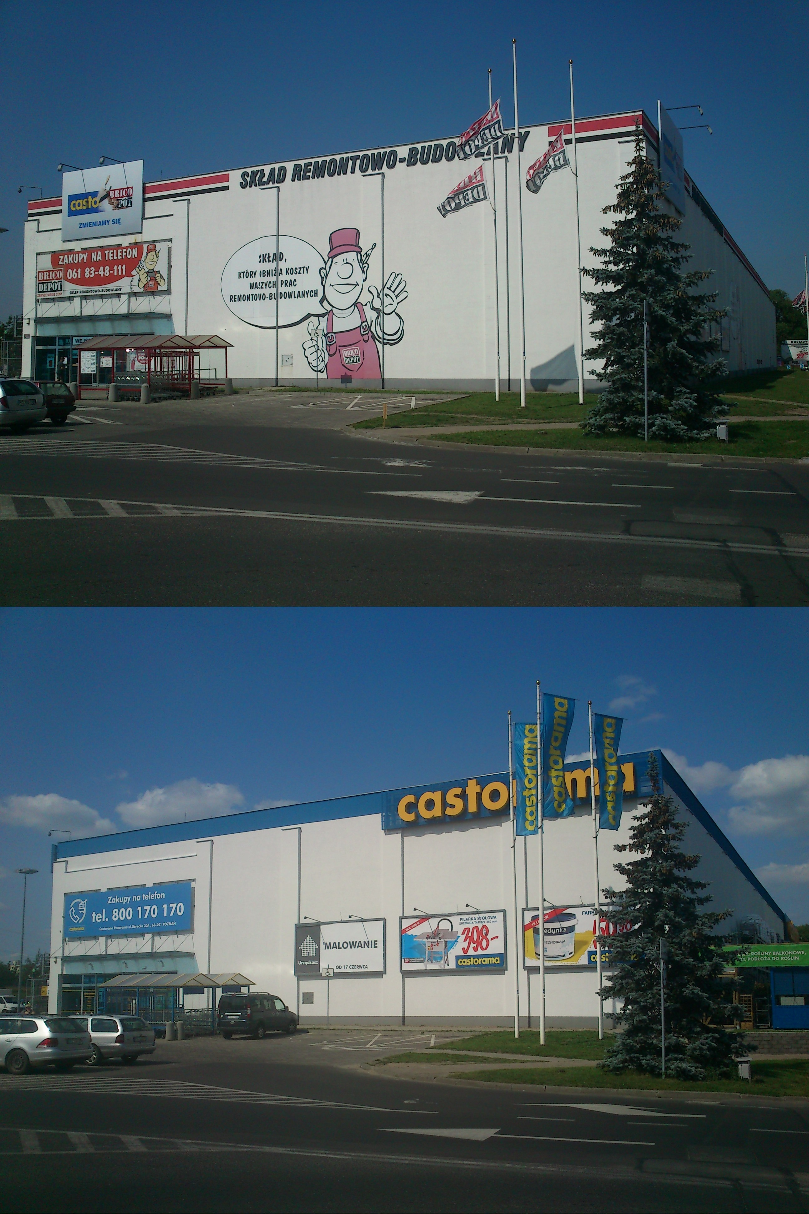 Rebranding sklepu Brico Dépôt w Poznaniu. Data wykonania zdjęć: 1. 29-06-2012 2. 06-07-2013